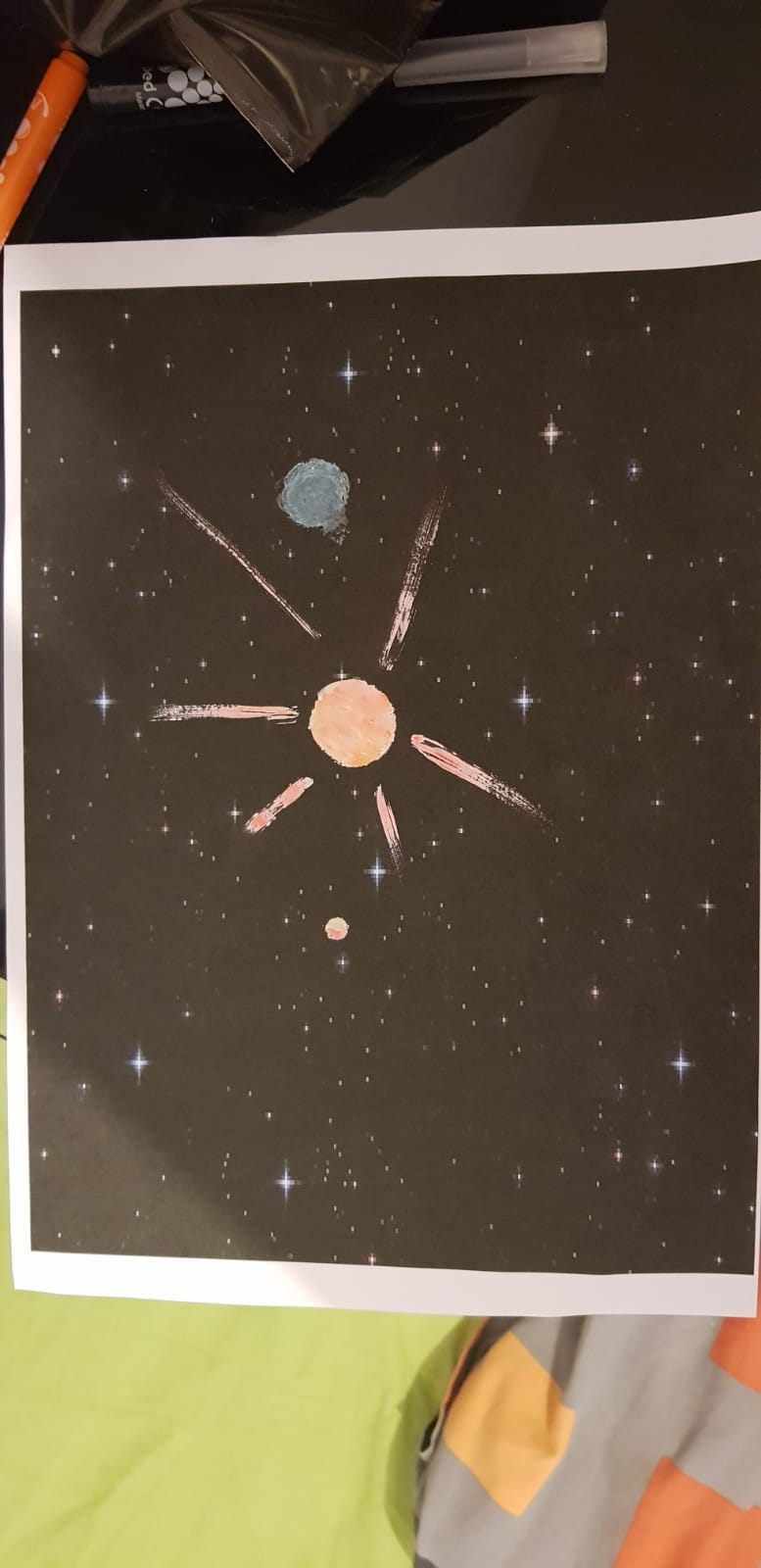 הציור צויר על ידי ילדה בכיתה ח' ומטרתו להמחיש את המערכת.